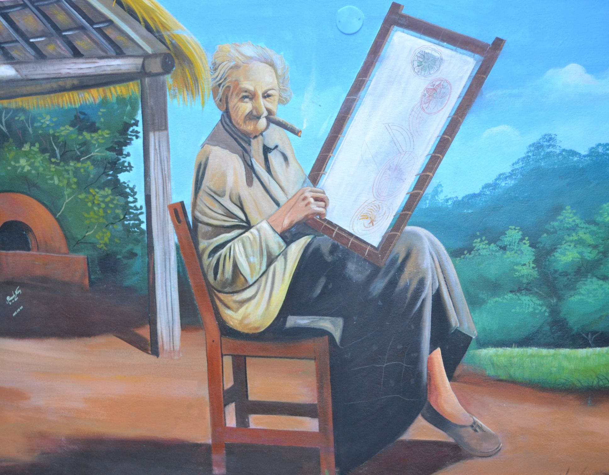 Mural de la tejedora del ñandutí situado en la plaza Martín de Barúa de la ciudad de Itauguá.